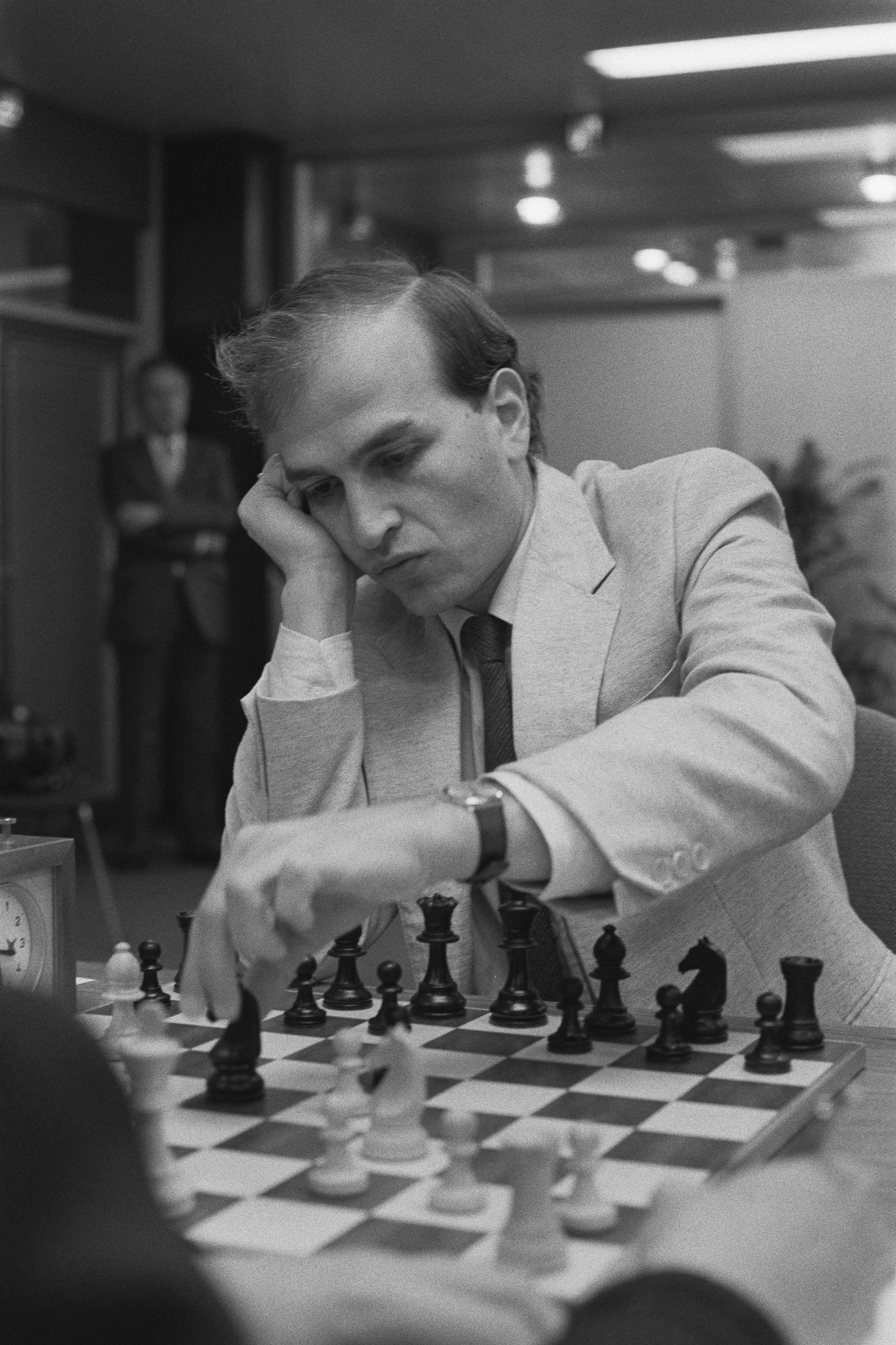 Laatste ronde Interpolis Schaaktoernooi in Tilburg 1986; Beljavsky.